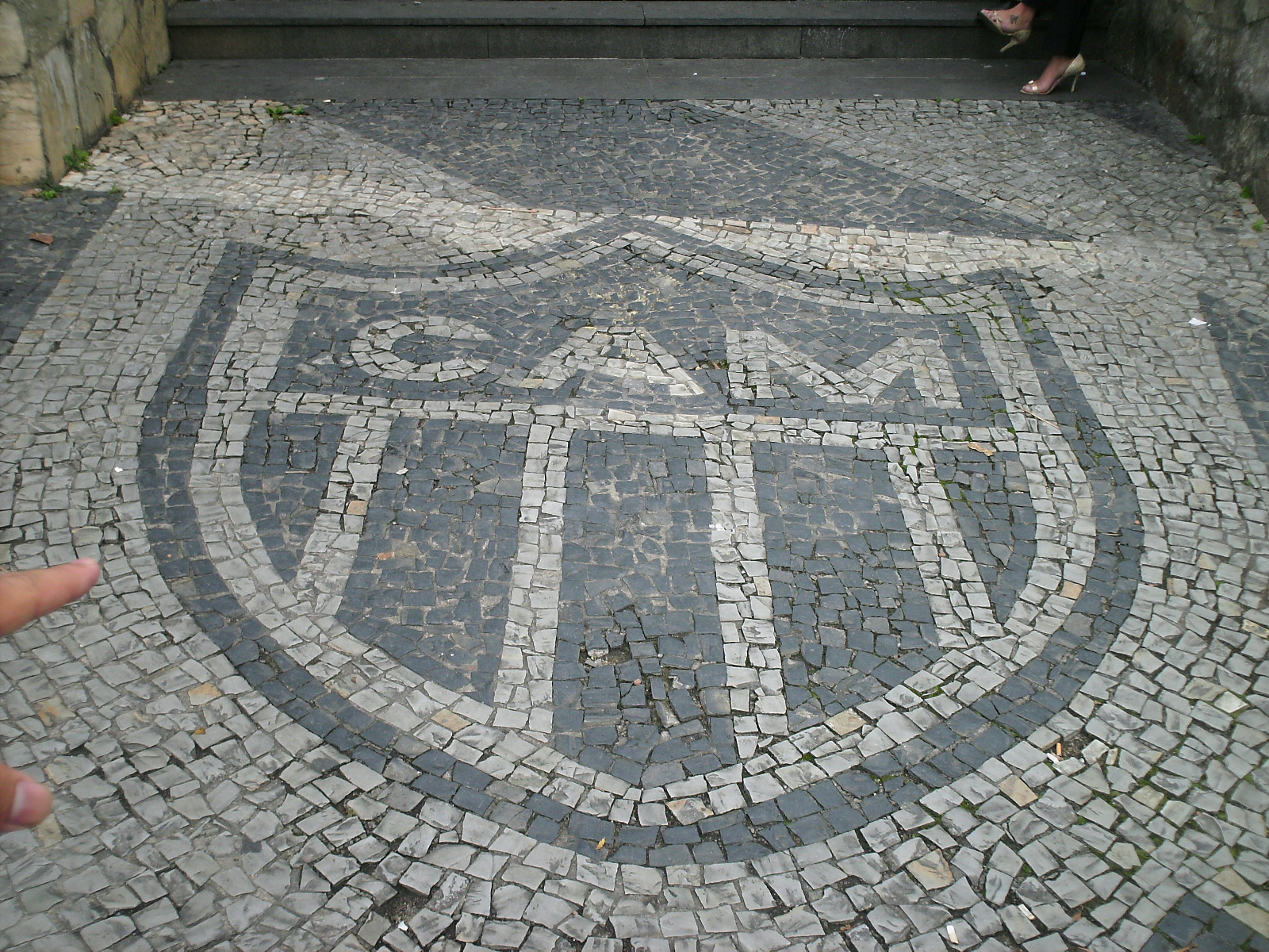 Símbolo do ' na calçada da "Loja do Galo"